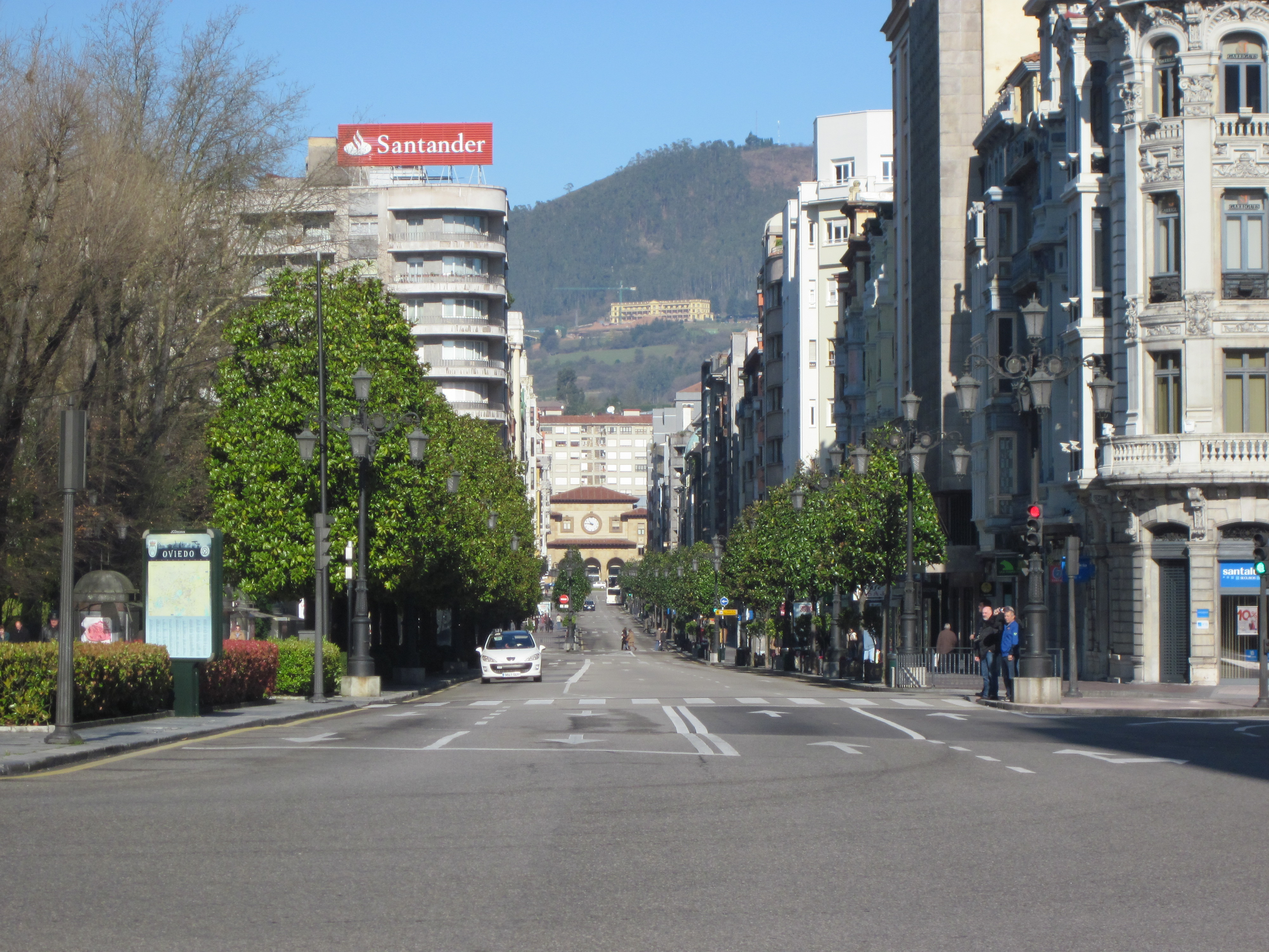 Calle de Uría en Oviedo, Principado de Asturias, España.